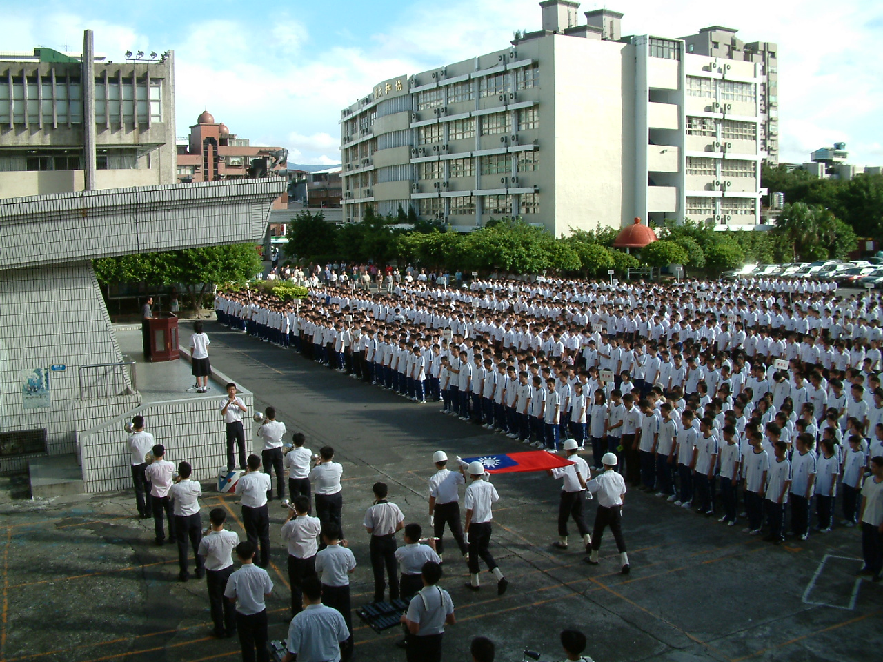 協和工商朝會